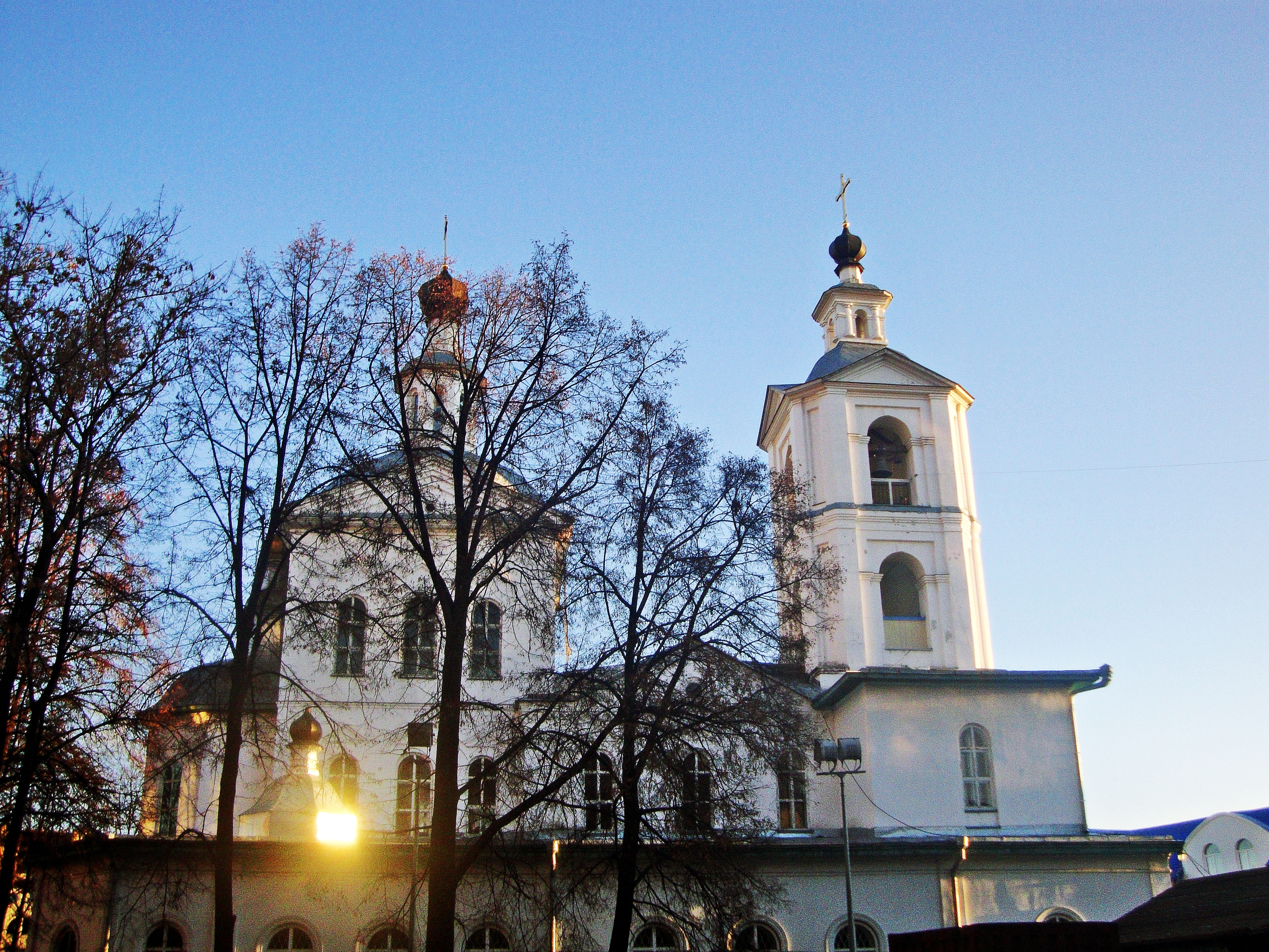 Церковь Михаила Архангела (Тюменская область, Тюмень, улица Ленина, 22)